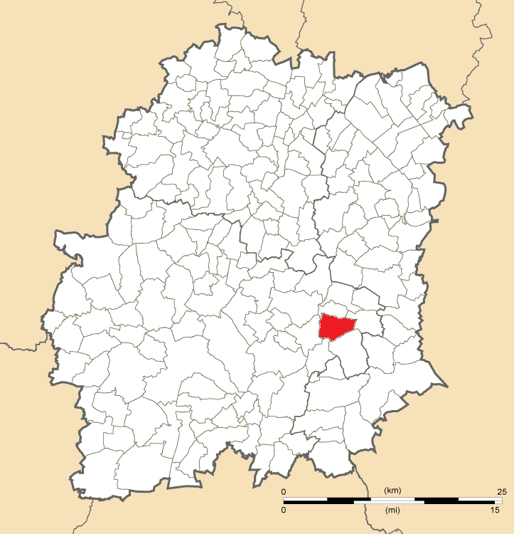 Carte de position de Guigneville-sur-Essonne en Essonne (91)